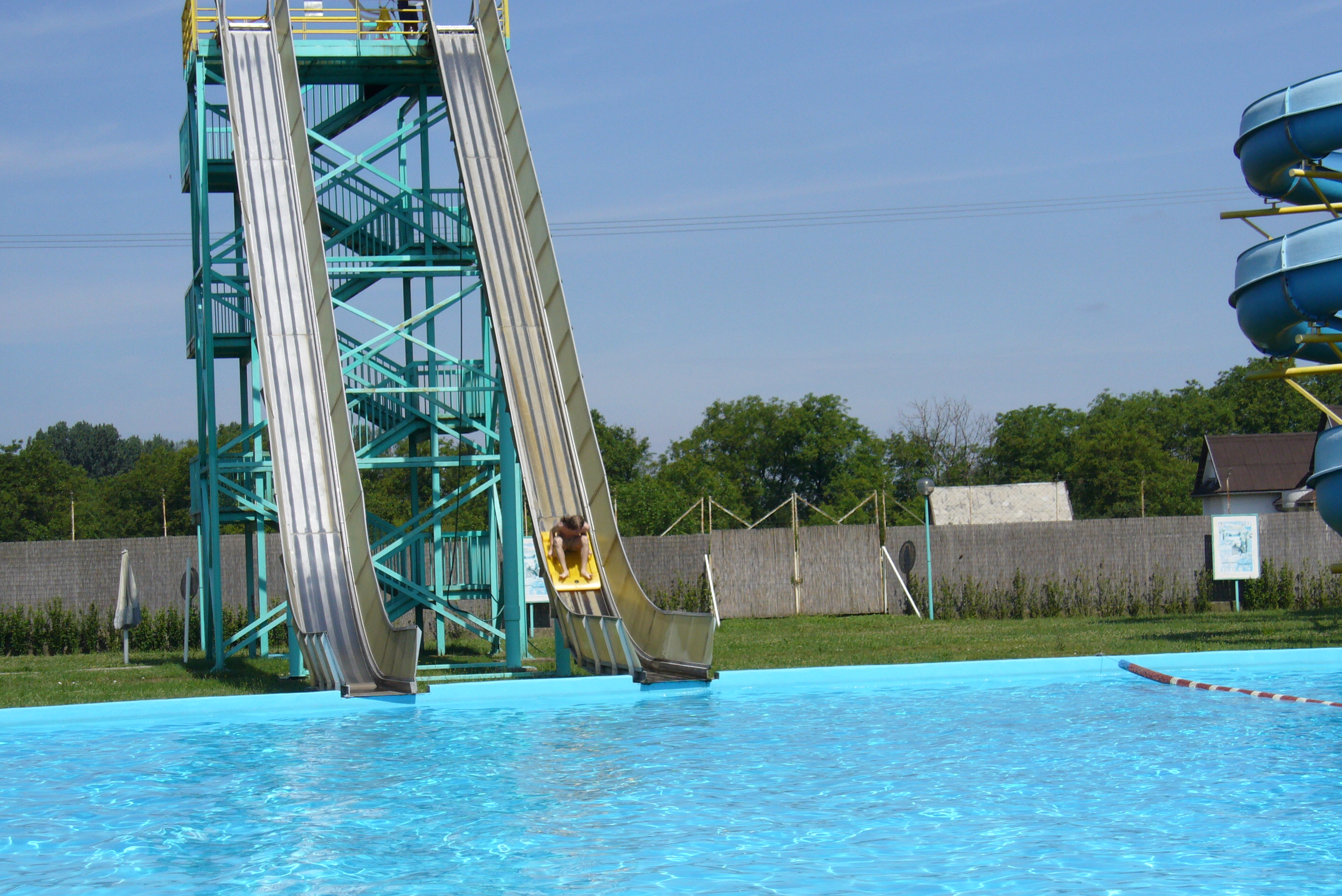 Gergelyiugornya - strand 02